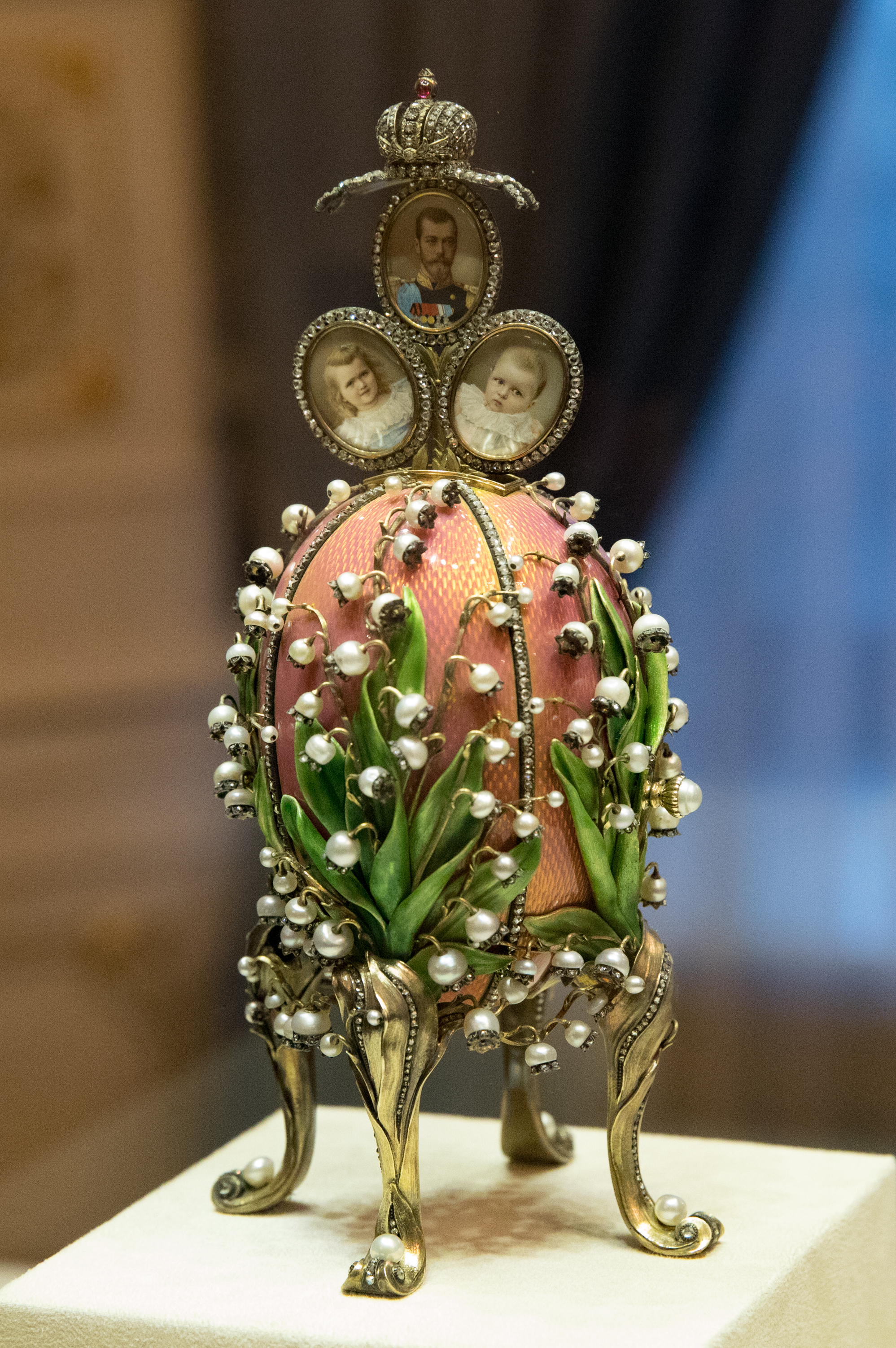 Fabergé Museum, Saint Petersburg, Russia